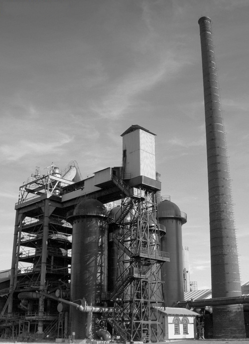 Zdjęcie przedstawia wielki piec byłej huty żelaza w Starachowicach, obecnie będący częścią Muzeum Przyrody i Techniki Ekomuzeum w Starachowicach. Na fotografii widoczny jest wielki piec oraz jego obiekty pomocnicze: nagrzewnice, wieża wyciągowa wsadu, komin opalania nagrzewnic oraz fragment hali lejniczej.